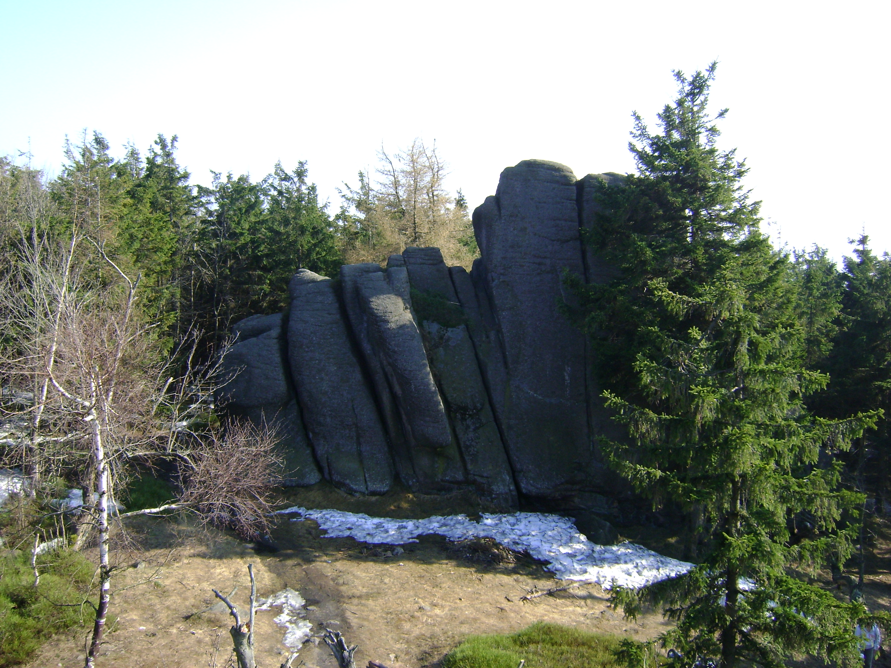 Skały nawzniesieniu Ostra Mała w południowo-zachodniej Polsce w Sudetach Zachodnich w Rudawach Janowickich woj. dolnośląskie.